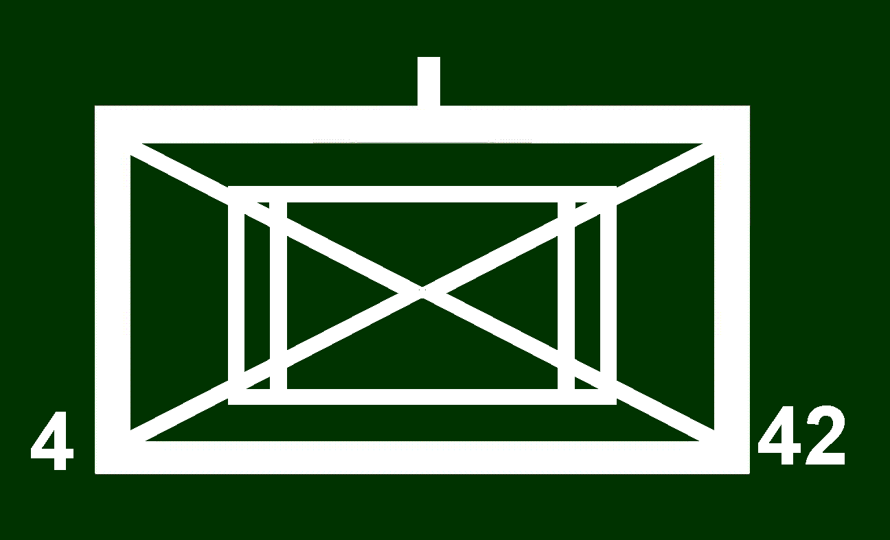 PanzergrenadierBtl (MTW)